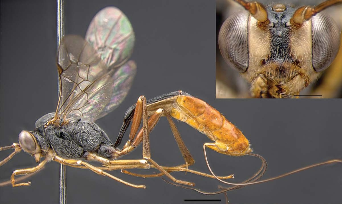 Schlupfwespe (= Ichneumonidae) der Unterfamilie Cremastinae, Trathala striata, Habitus von der Seite, und Gesicht von vorne, Verbreitung Südkorea und Indien.